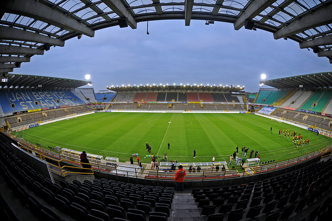 Jan Breydel Stadion